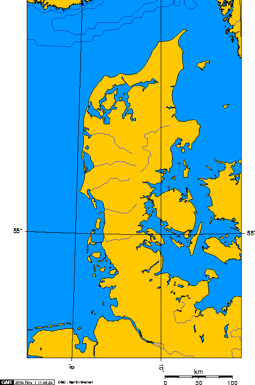 jutland peninsula, europe